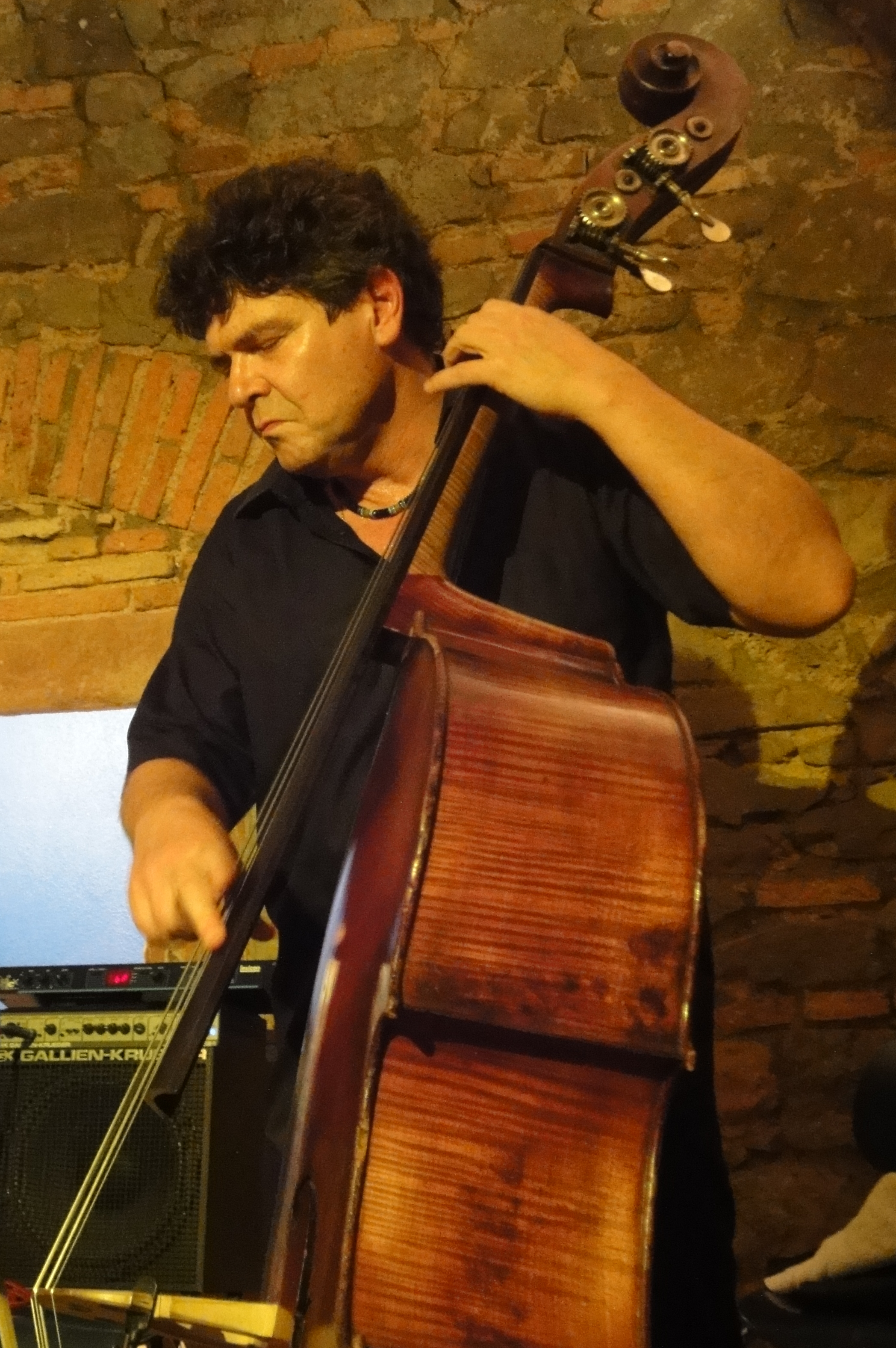 Carlos Bica im Konzert mit dem Kristiina Tuomi Trio im Jazzinstitut Darmstadt am 19. Oktober 2010